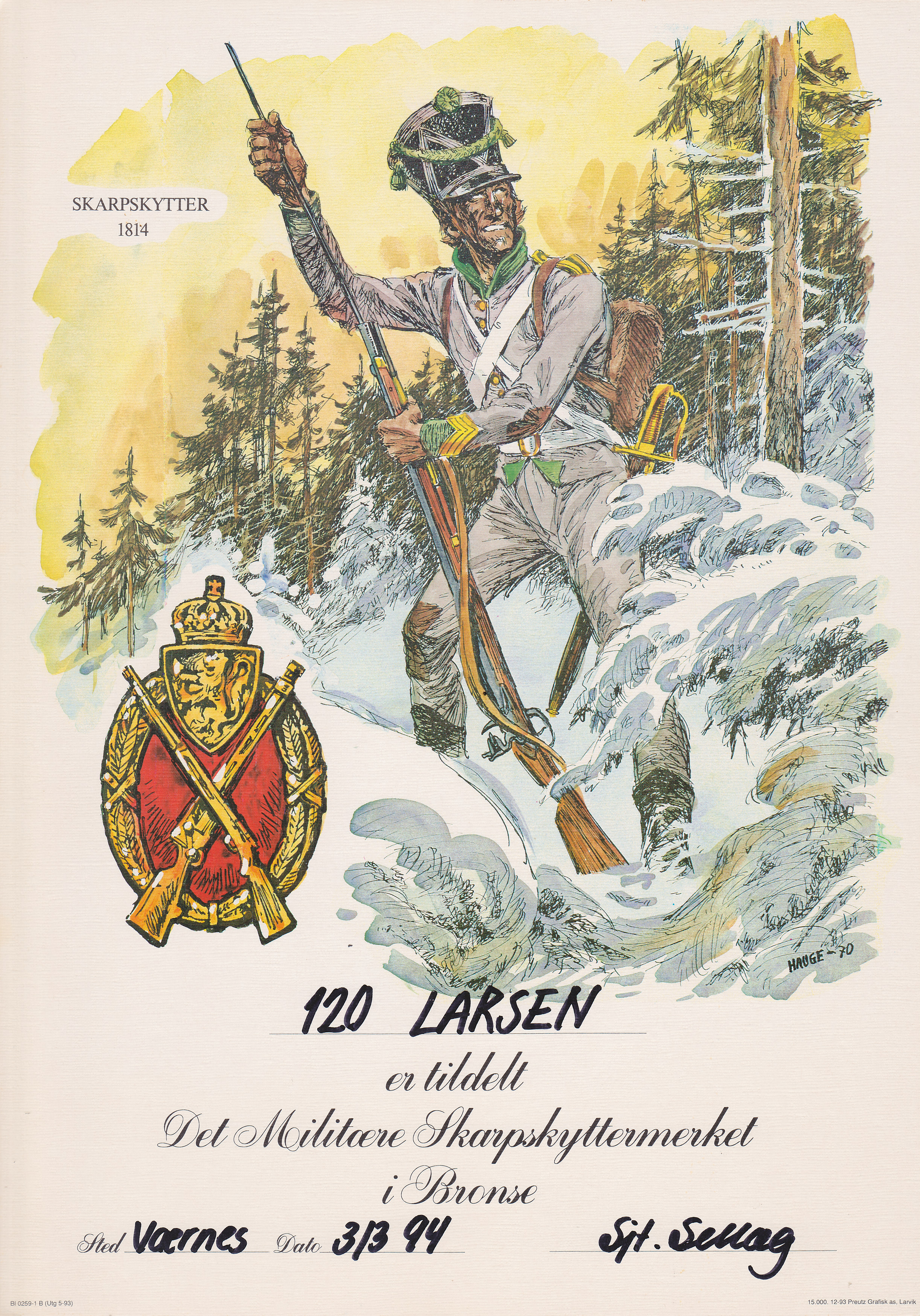 Skyttermerke, Værnes flystasjon.